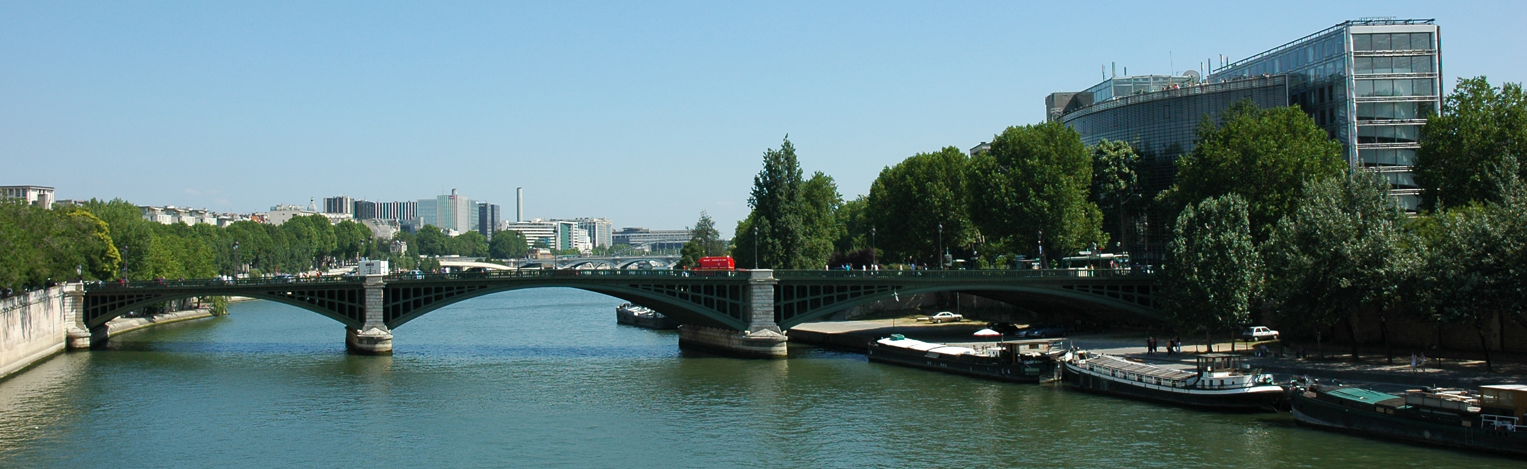 Pont de Sully entre l'Île Saint-Louis et l'Institut du Monde Arabe, Paris, France. Photographie prise par Patrick GIRAUD